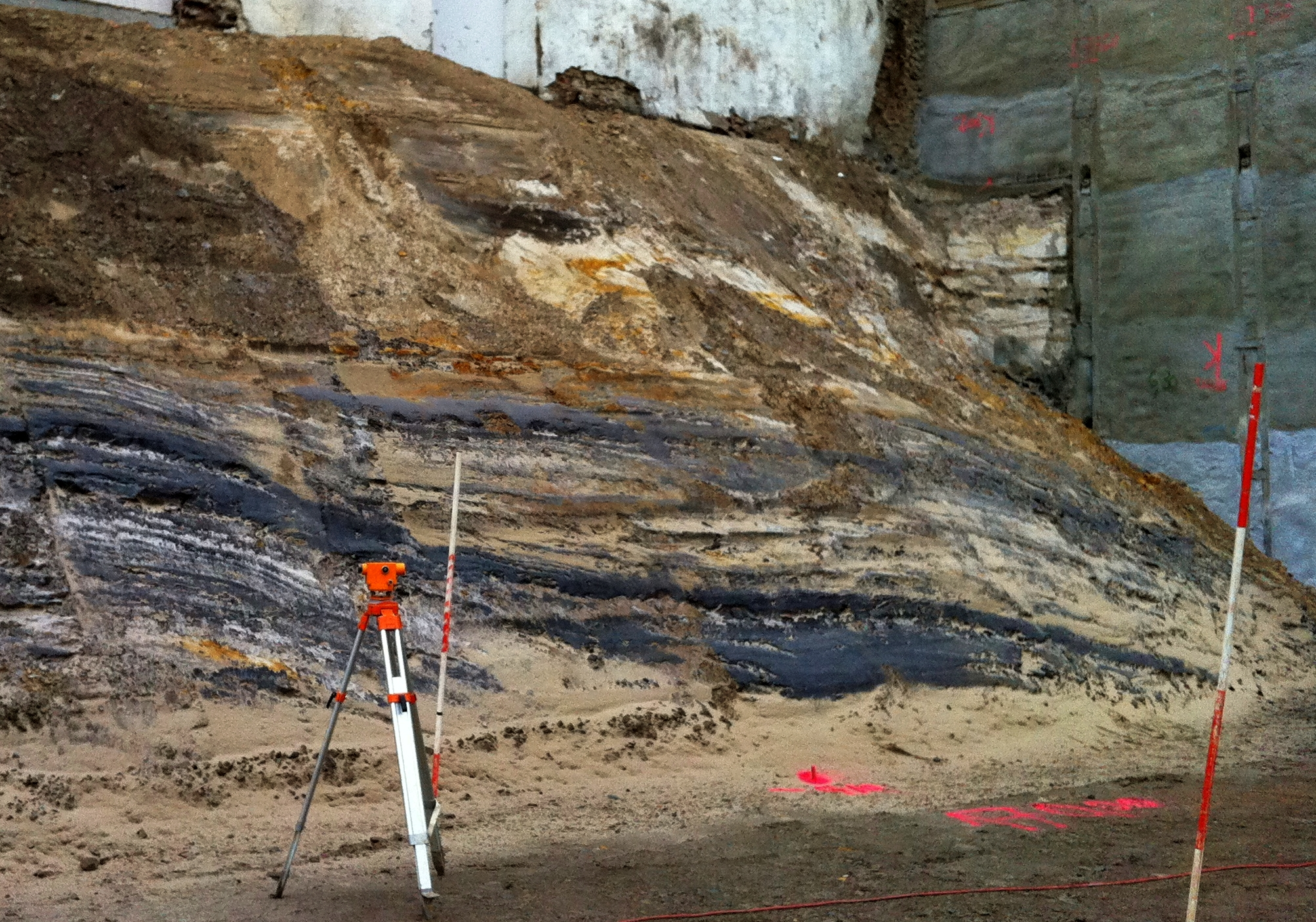 Aachener Kreide: Übergang von den dunkelen Tonen der Hergenrath-Schichten in die hangenden Aachener Sande,Temporäre Baugrube Aachen, Sandkaulstraße